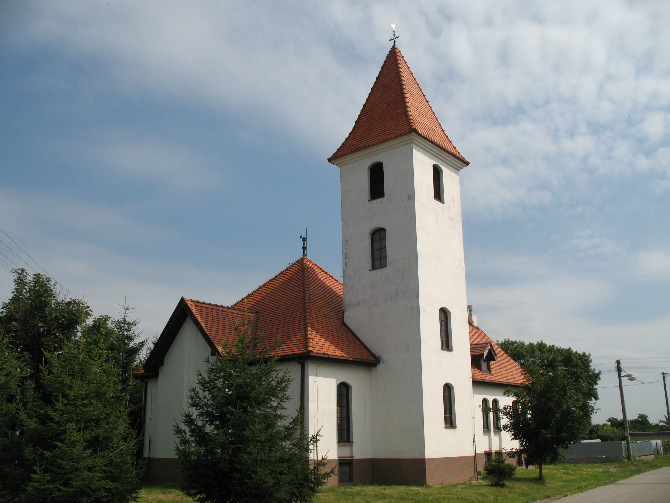 Bögellő